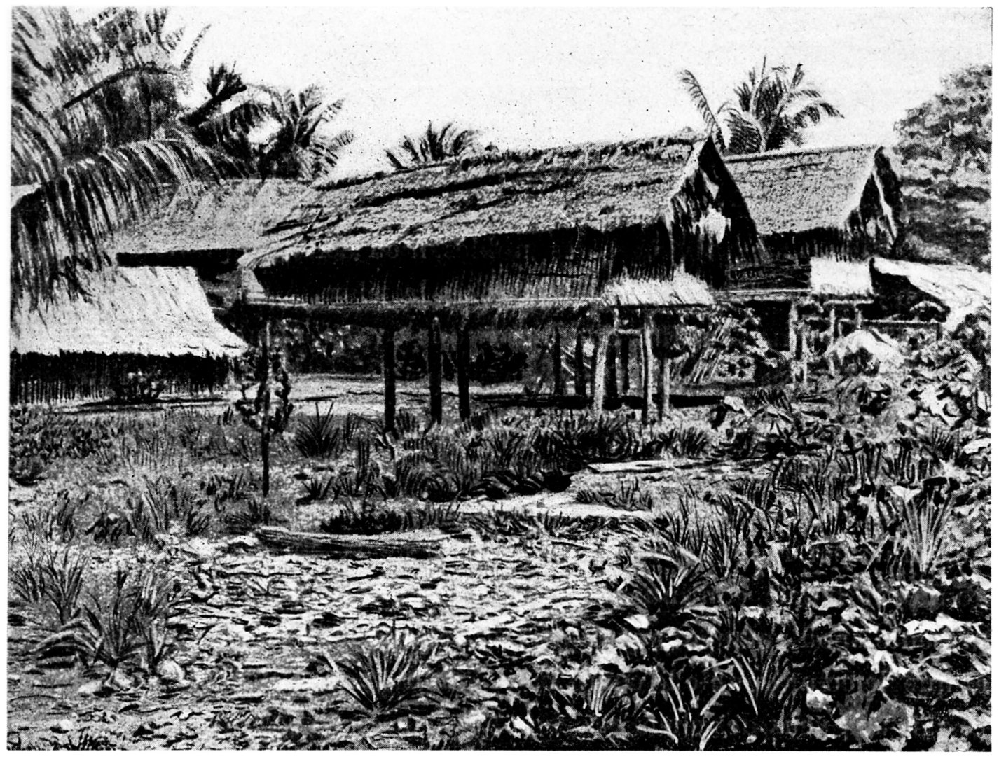 maisons sur pilotis, ile fauro (archipel salomon)